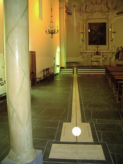 Transito del Sole sulla linea meridiana al solstizio d'inverno